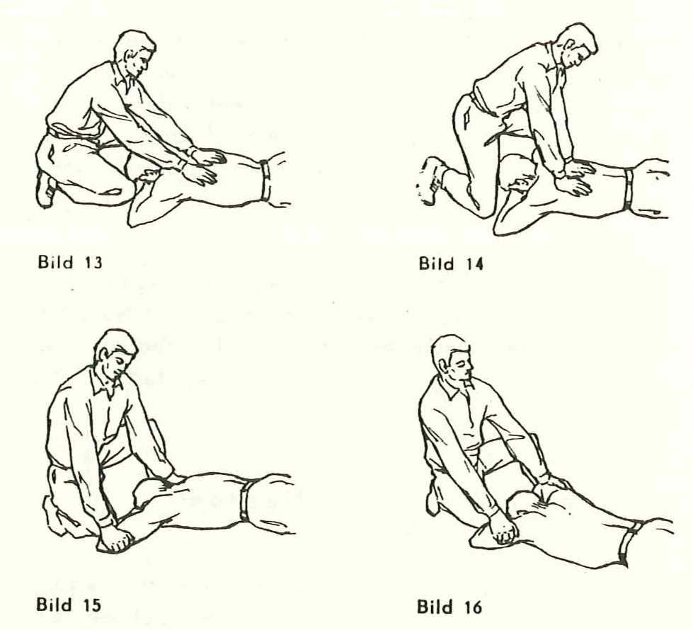 Darstellung der Rückendruck-Armzug-Methode nach Holger Nielsen (amtliches Werk)